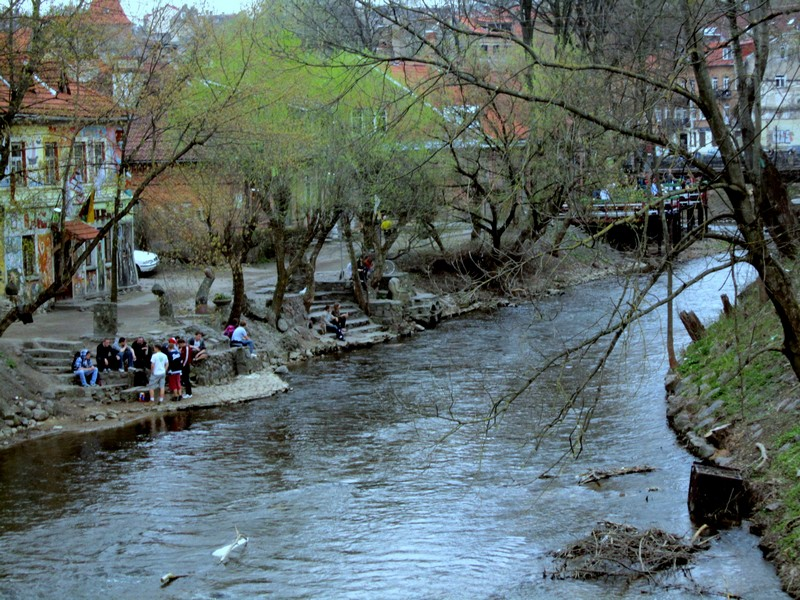 Užupio meno inkubatorius prie Vilnios upės 2011 metais